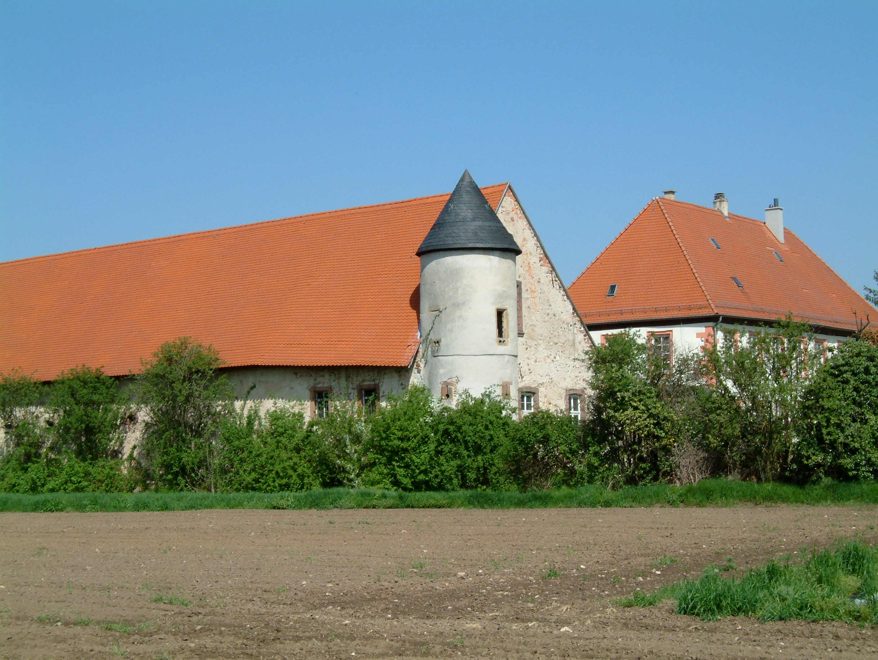 Bischöfliches Schloss zu Dirmstein, selbst fotografiert am 28.04.2006 und freigegeben durch Benutzer:Mundartpoet